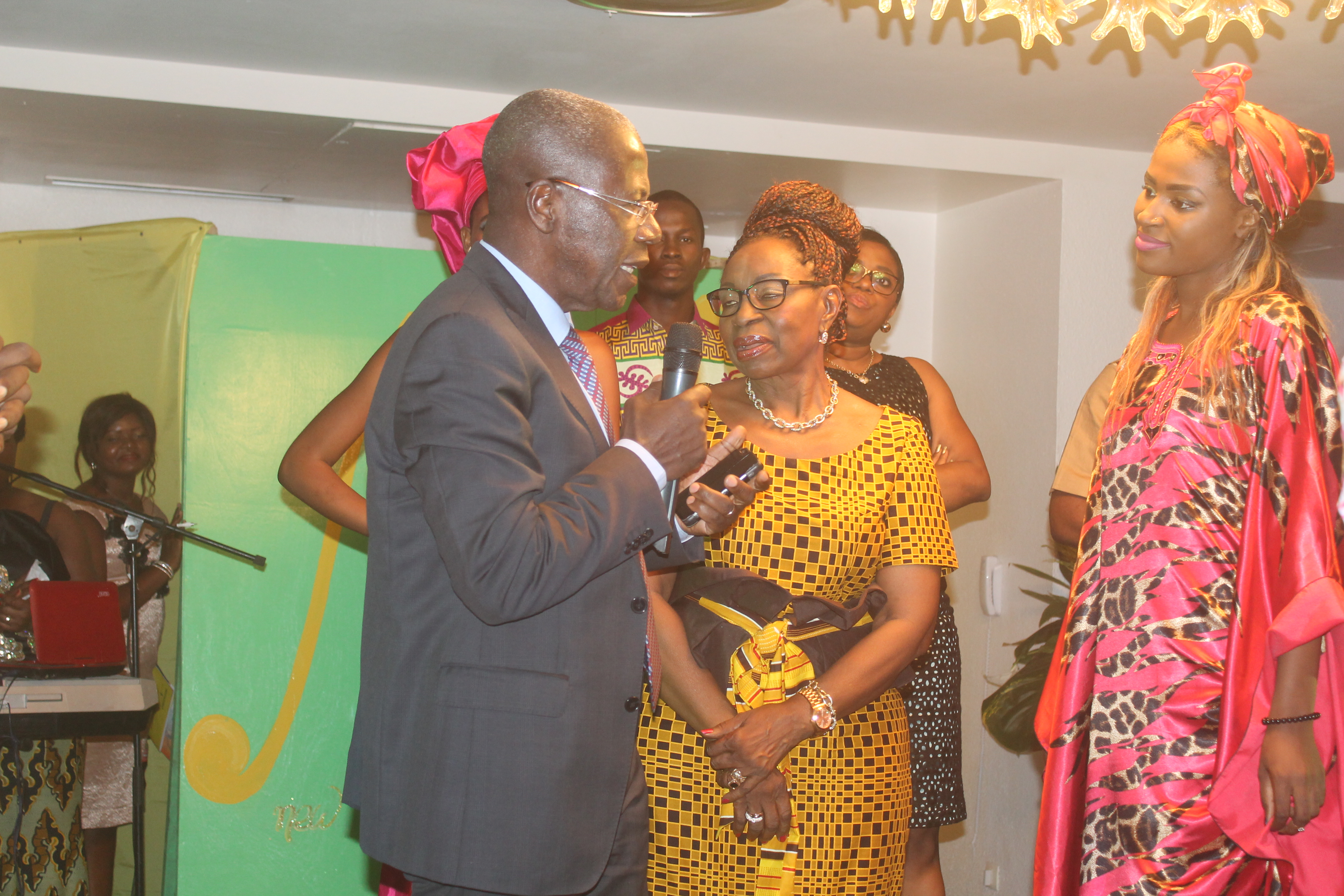 Mireille Nemale de la cérémonie pendant la remise des diplômes de sortie à ses étudiants en compagnie de Monsieur André Siaka, ancien directeur général des Brasseries du Cameroun